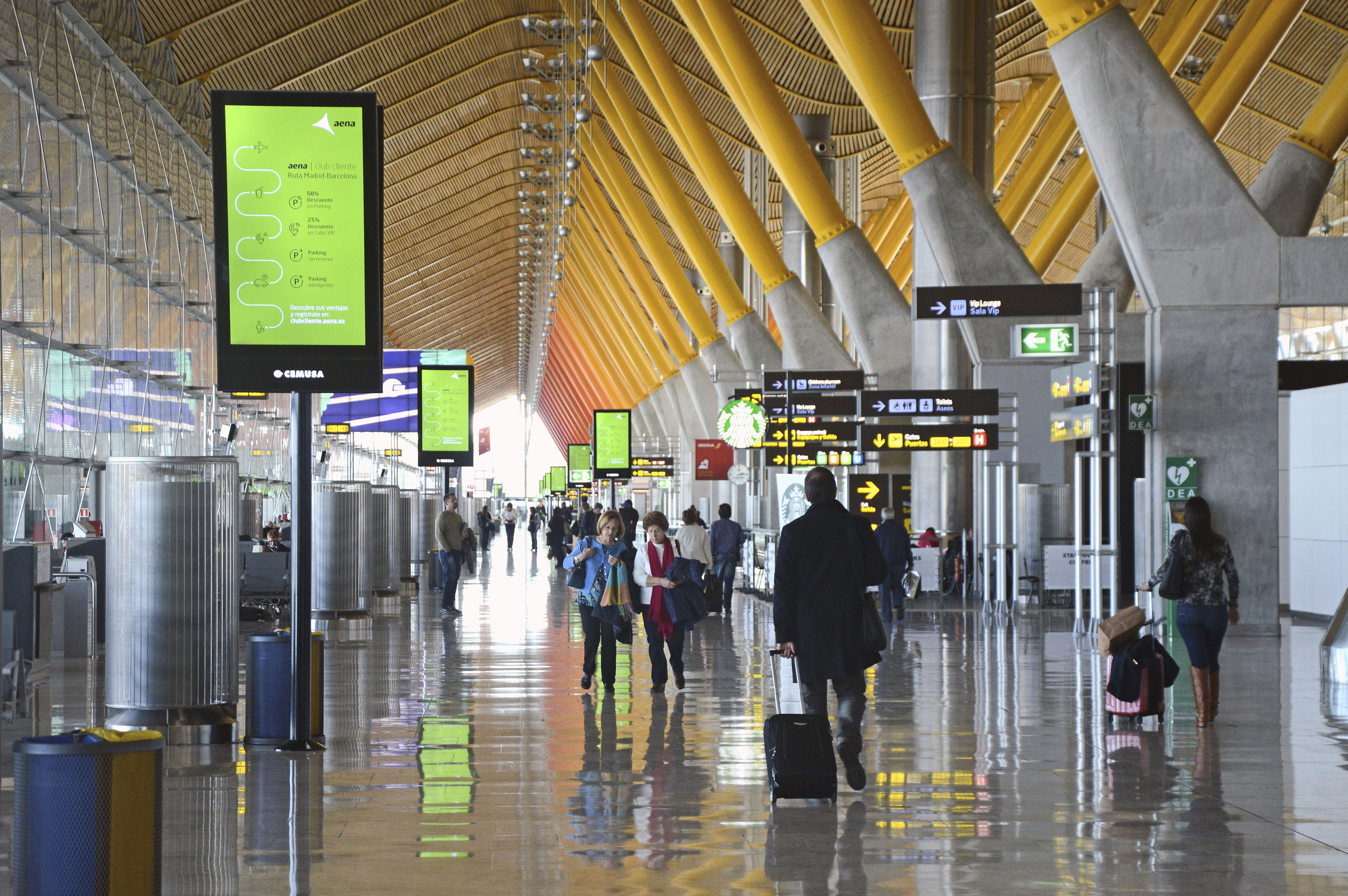 Interior de la terminal T4 del Aeropuerto Adolfo Suárez Madrid-Barajas